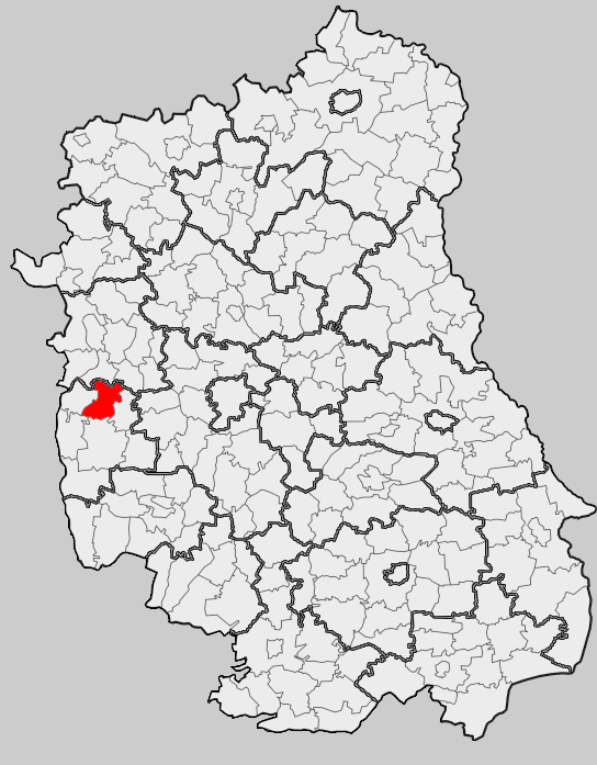 Map of gmina Karczmiska, Opole Lubelskie county, Lublin voivodship Mapa gminy Karczmiska, powiat opolski, województwo lubelskie